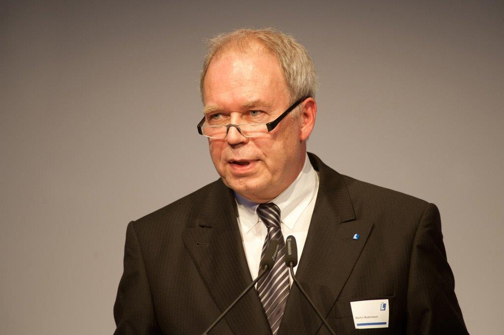 Martin Mudersbach, Präsident des Bundesverbands Deutscher Leasing-Unternehmen